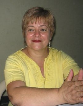 Foto de la senadora colombiana Gloria Inés Ramírez